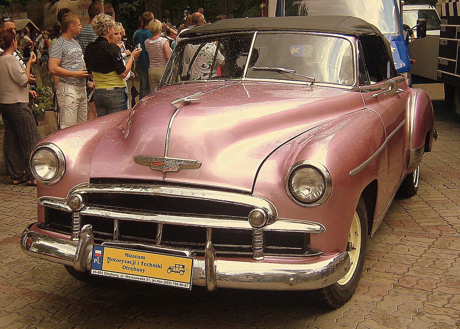 Chevrolet Delux w Międzyzdrojach.